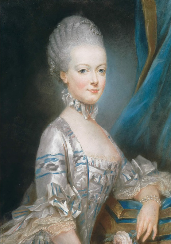 Porträt Marie-Antoinettes